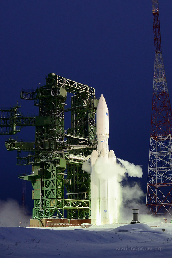 Первый испытательный пуск ракеты-носителя тяжелого класса «Ангара-А5» (космодром Плесецк, Архангельская обл.)